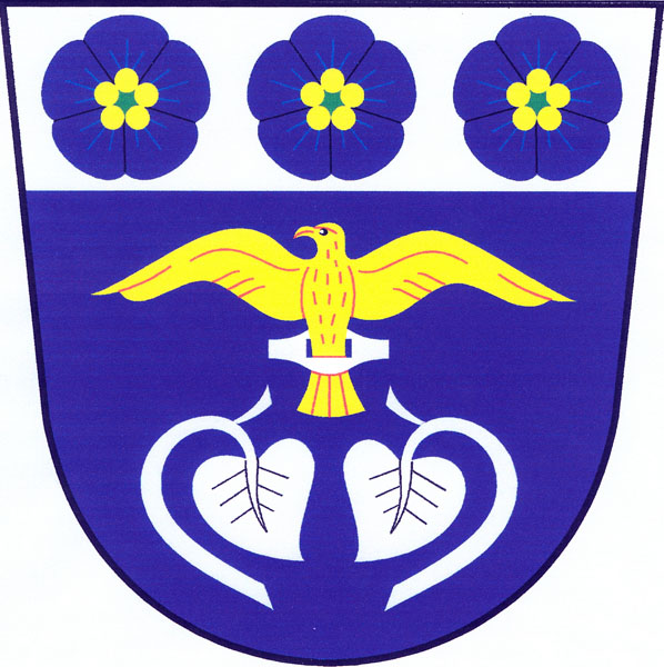 Znak obce Jestřebí (okres Náchod)